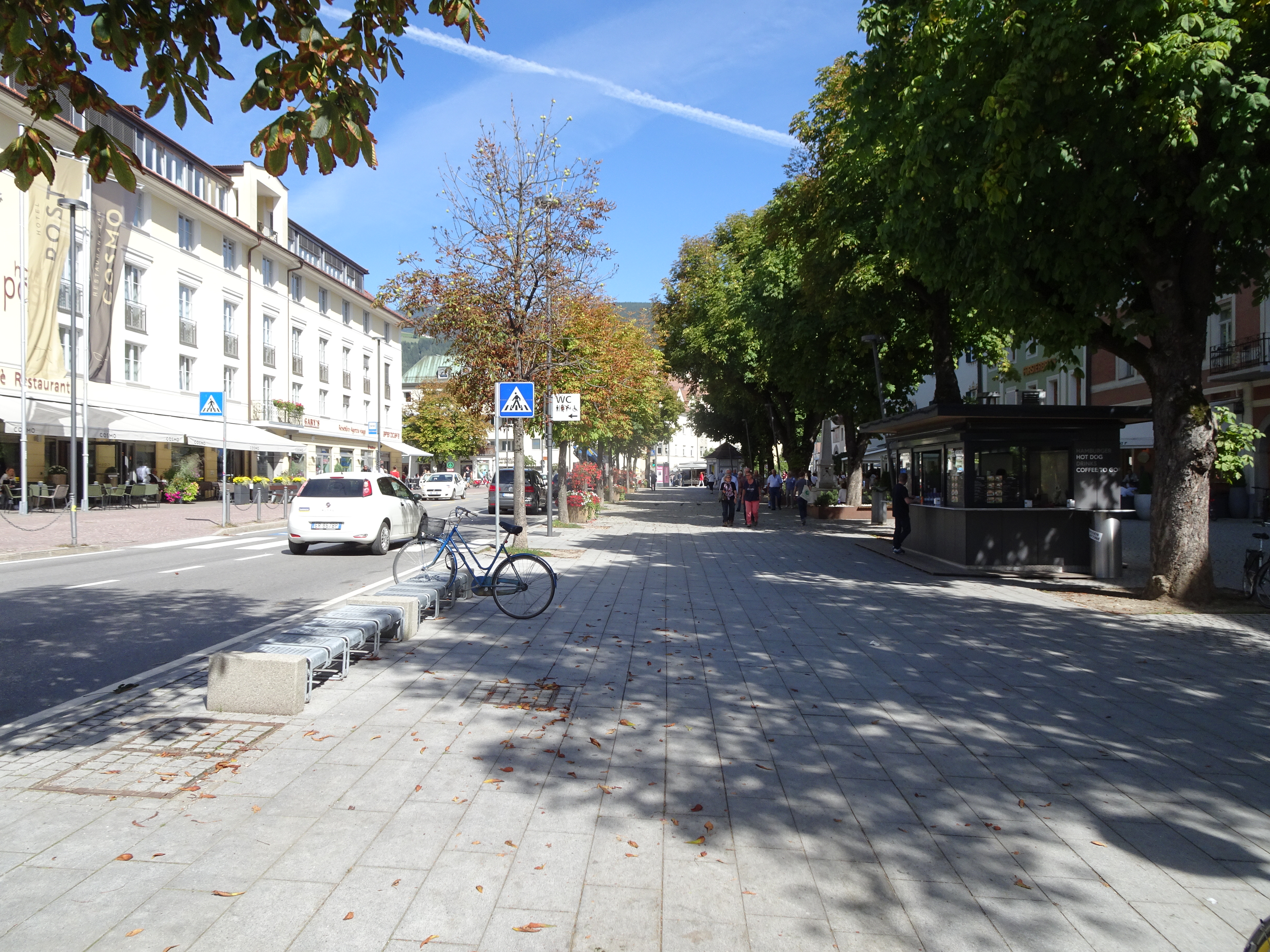 Straße "Graben" in Bruneck in Italien